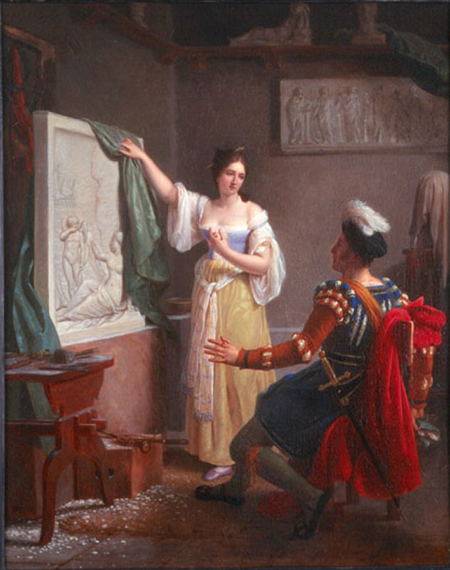 Properzia de Rossi dokončila reliéf Josef a Potifarova žena